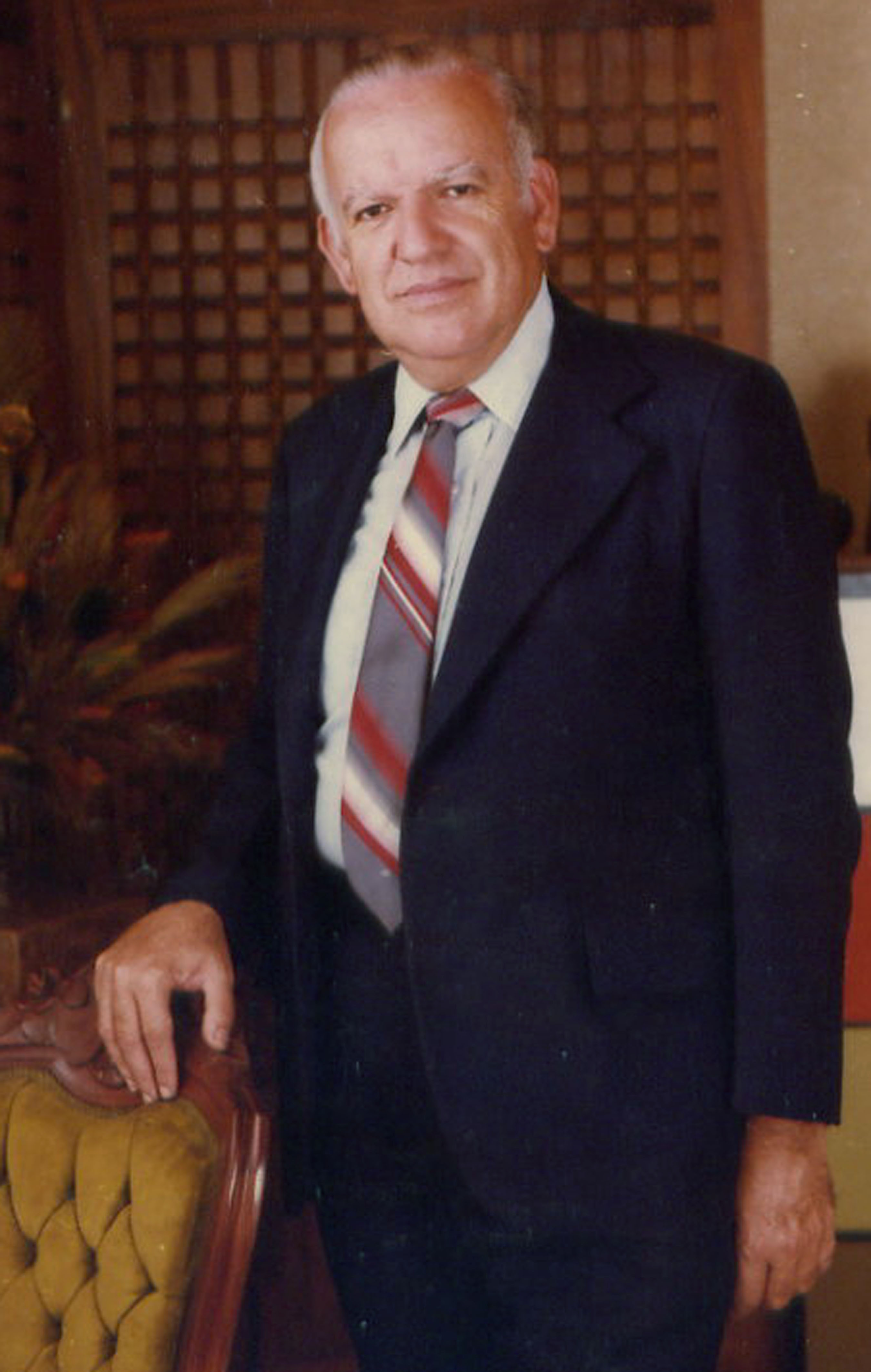 Carlos Meléndez Chaverri